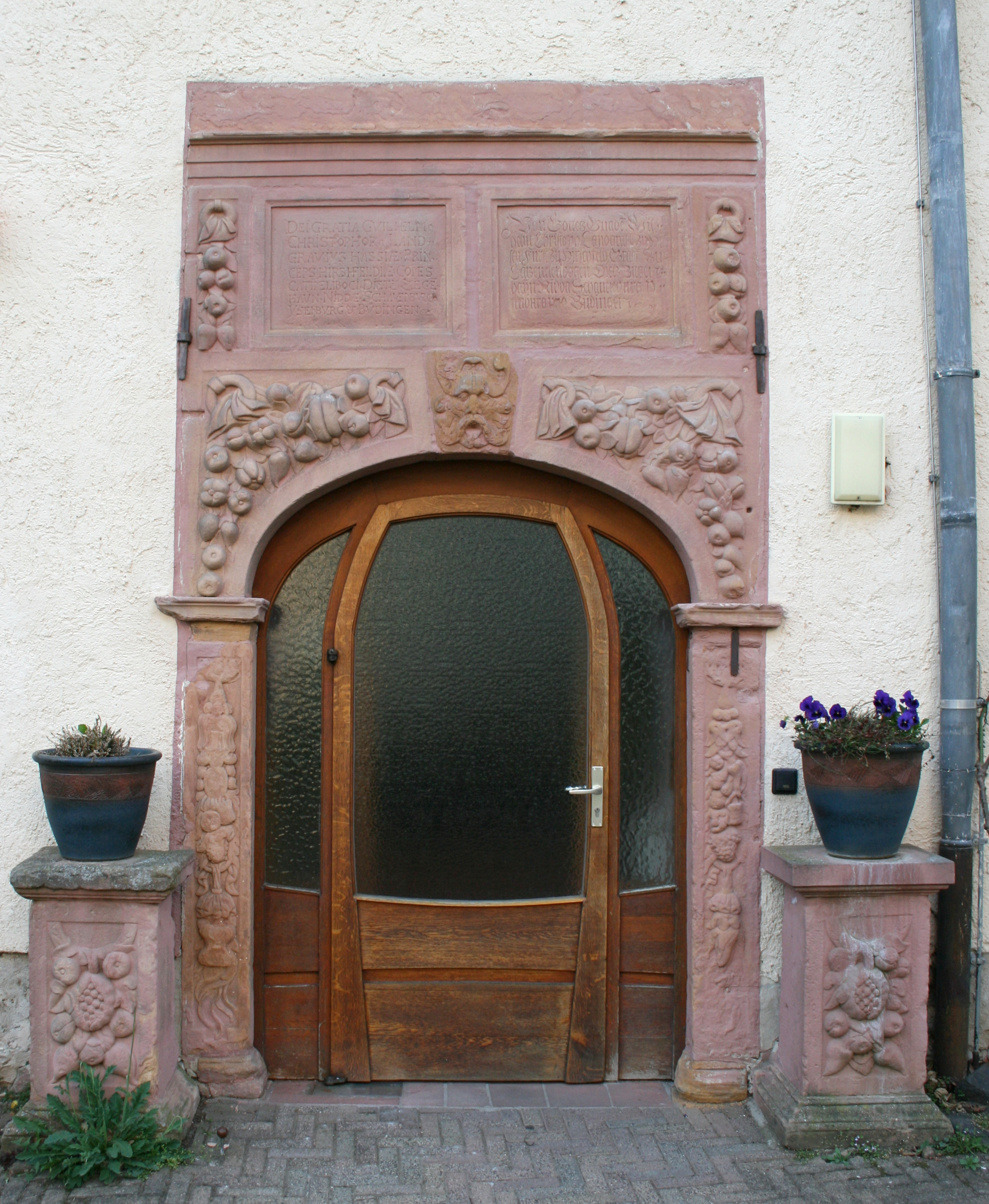 Schloss Bingenheim, Echzell, Wetteraukreis, Hessen. Portal des Langen Bau in der Kernburg von 1675.